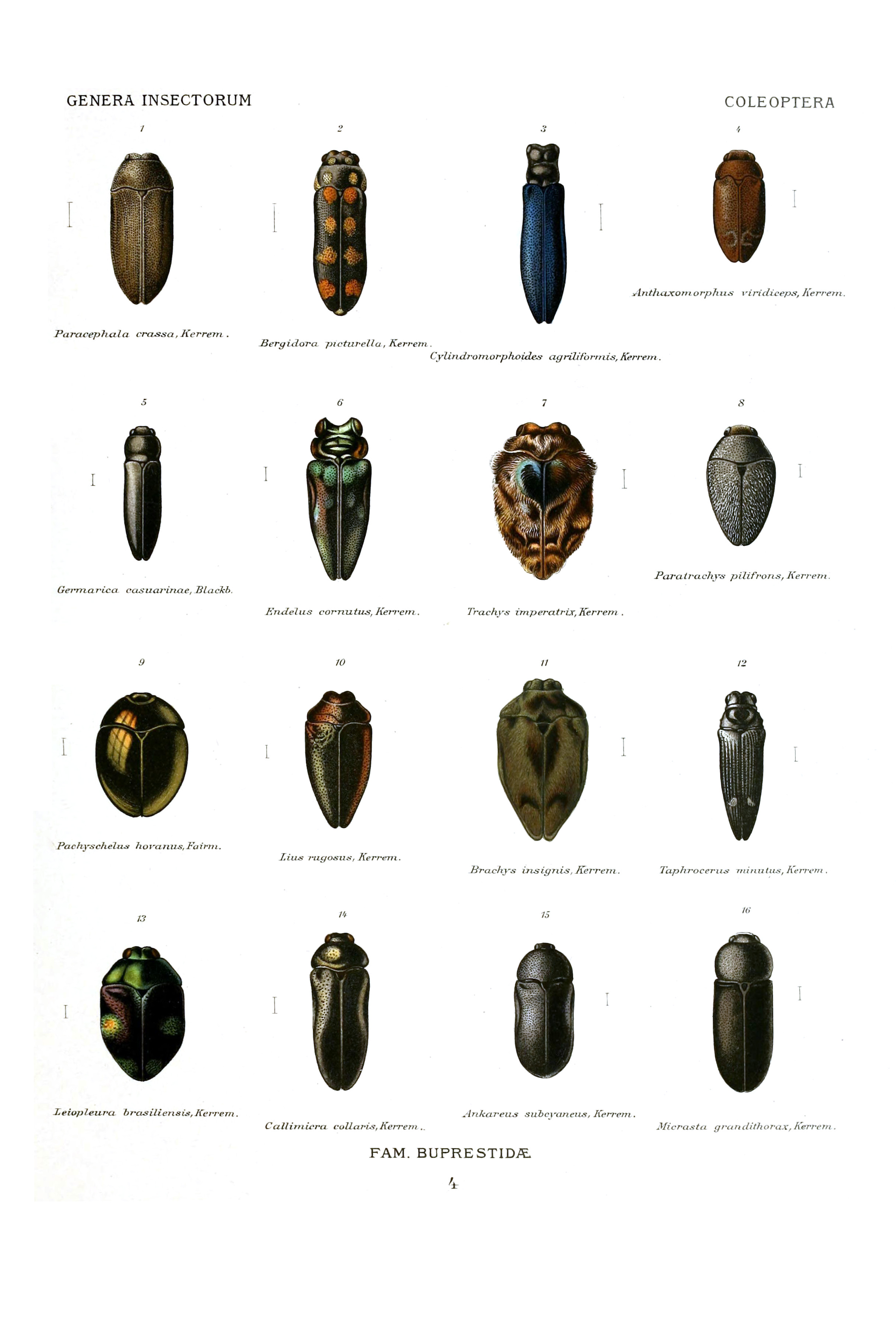 Paracephala crassa Kerrem. = Meliboeithon crassa (Kerremans, 1898) Bergidora picturella Kerrem. = Bergidora picturella (Kerremans, 1887) Cylindromorphoides agriliformis Kerrem. = Cylindromorphoides agriliformis (Kerremans, 1897) Anthaxomorphus viridiceps Kerrem. = Sambus viridiceps (Kerremans, 1900) Germarica casuarinae Blackb. = Germarica lilliputana (Thomson, 1879) Endelus cornutus Kerrem. = Endelus cornutus Kerremans, 1900 Trachys imperatrix Kerrem. = Trachys imperatrix Kerremans, 1894 Paratrachys pilifrons Kerrem. = Paratrachys pilifrons (Kerremans, 1900) Pachyschelus hovanus Fairm. = Galbella hovana (Fairmaire, 1902) Lius rugosus Kerrem. = Lius rugosus Kerremans, 1903 Brachys insignis Kerrem. = Brachys insignis Kerremans, 1899 Taphrocerus minutus Kerrem. = Taphrocerus minutus Kerremans, 1903 Leiopleura brasiliensis Kerrem. = Leiopleura brasiliensis Kerremans, 1903 Callimicra collaris Kerrem. = Callimicra collaris Kerremans, 1900 Ankareus subcyaneus Kerrem. = Ankareus subcyaneus Kerremans, 1894 Micrasta grandithorax Kerrem. =? Micrasta amplithorax Kerremans, 1893